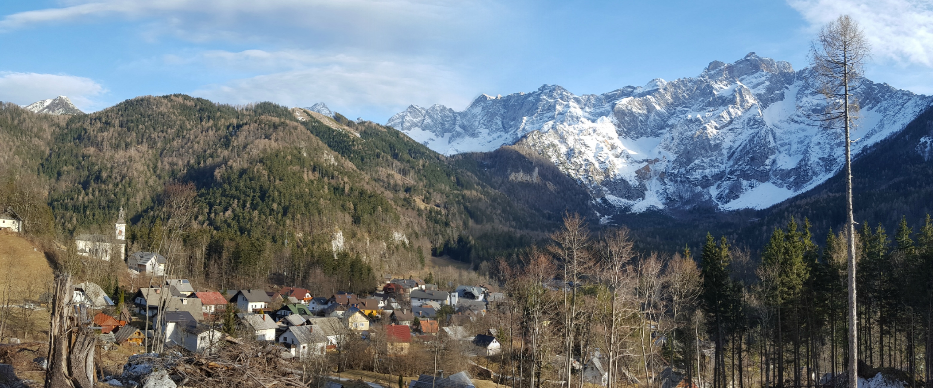 Zgornje Jezersko v Kamniških Alpah